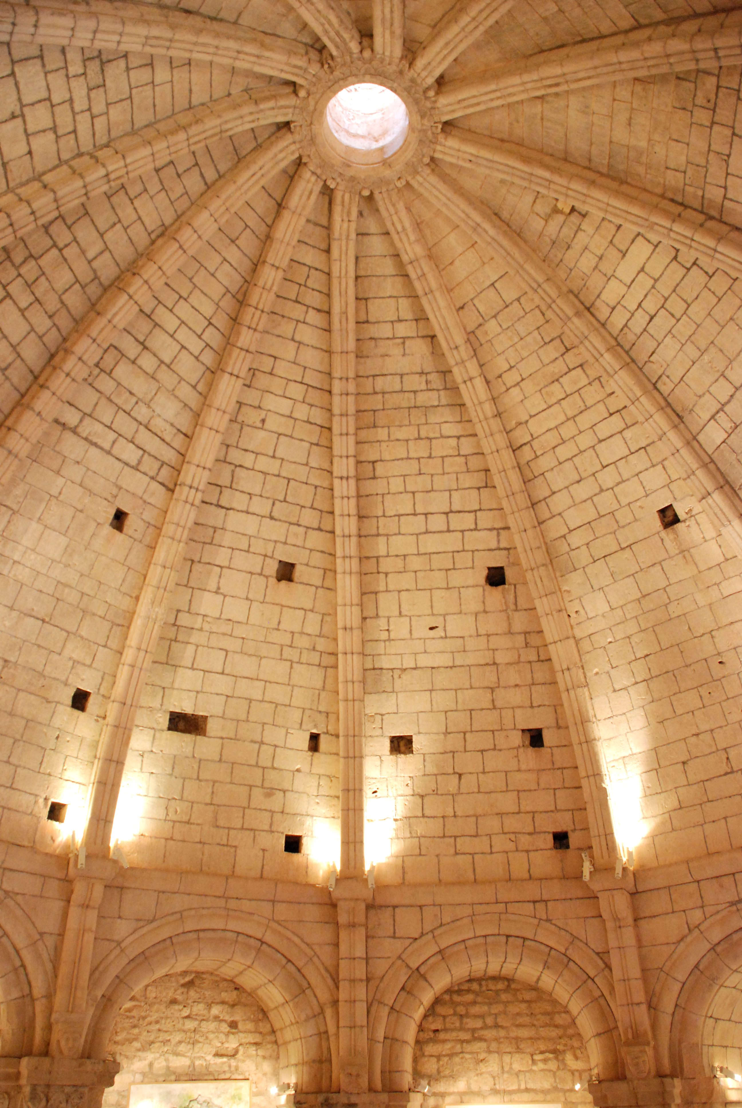 France - Provence - Château de Simiane-la-Rotonde